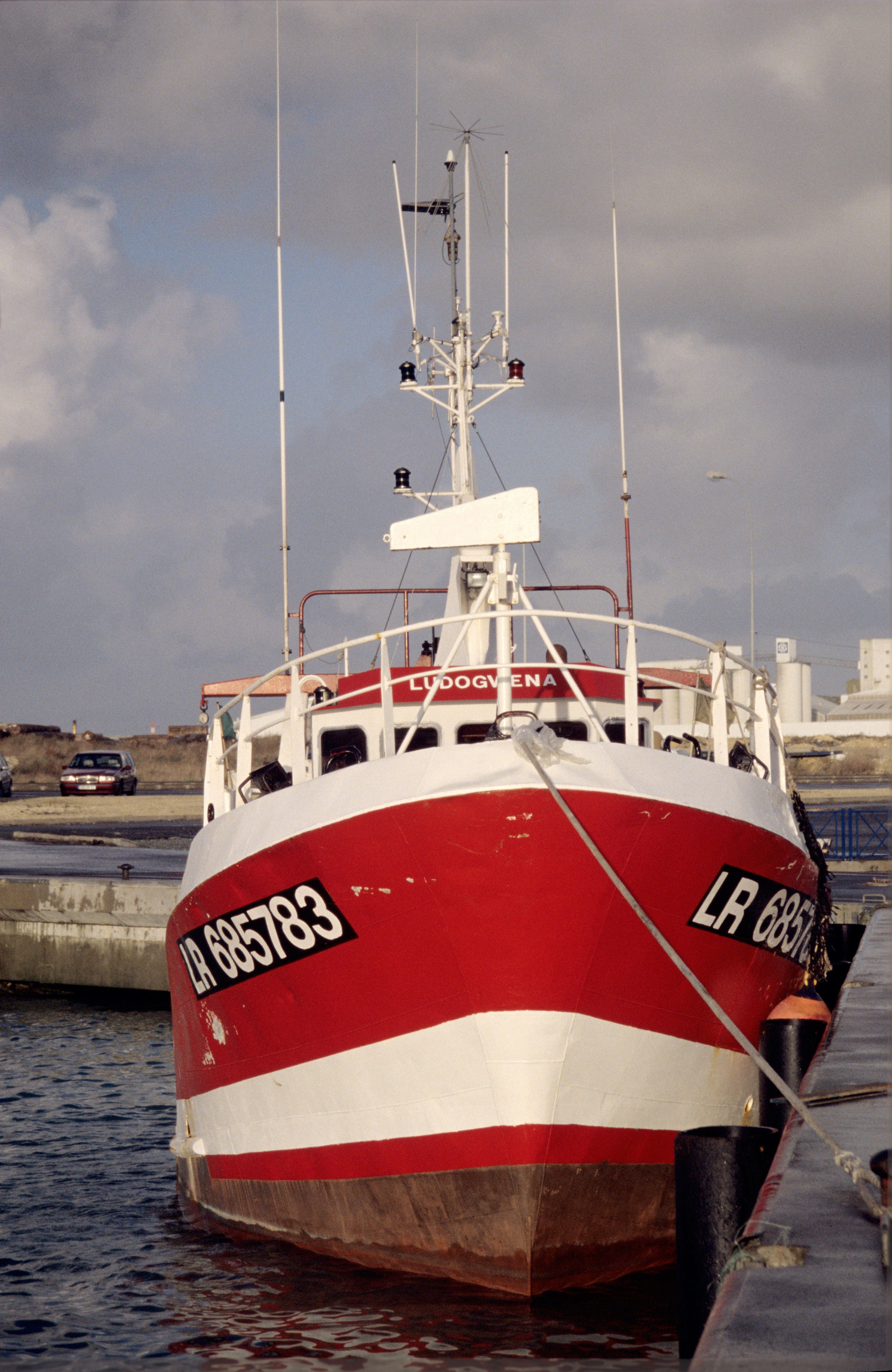 La proue du chalutier hauturier "Ludogvena". Port de pêche de Chef de Baie, La Rochelle, Charente Maritime, France.